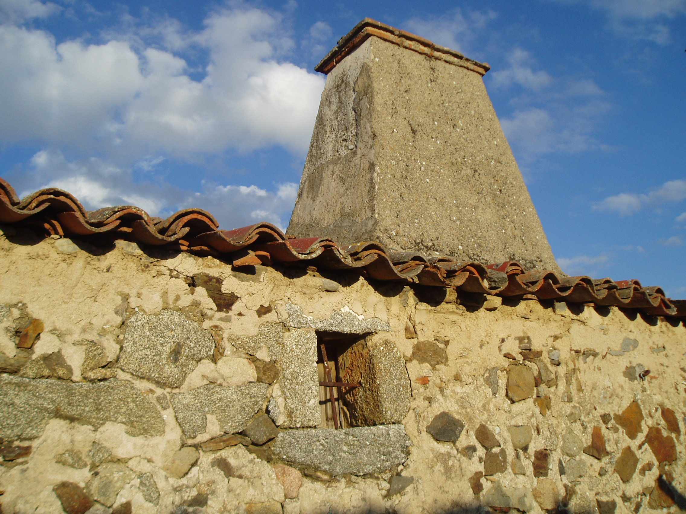 Casa típica rural, hecha de piedra con su chimenea.